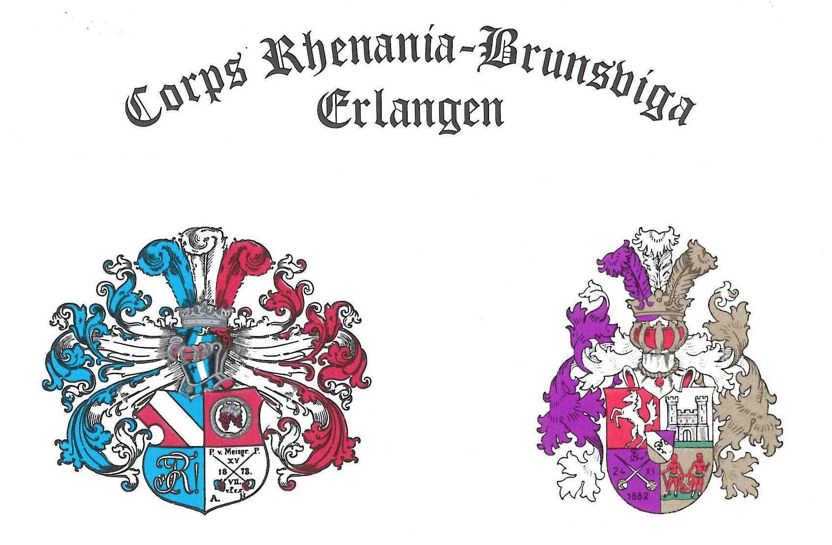 Wappen der Corps Rhenania Erlangen und Brunsviga München